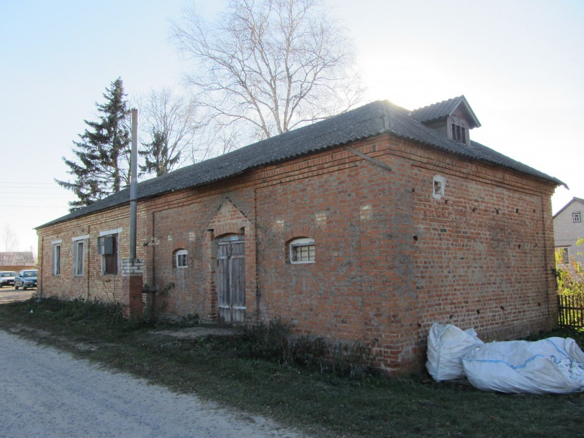 Адахаўшчына. Сядзіба Рдутлоўскіх. Гаспадарчая пабудова